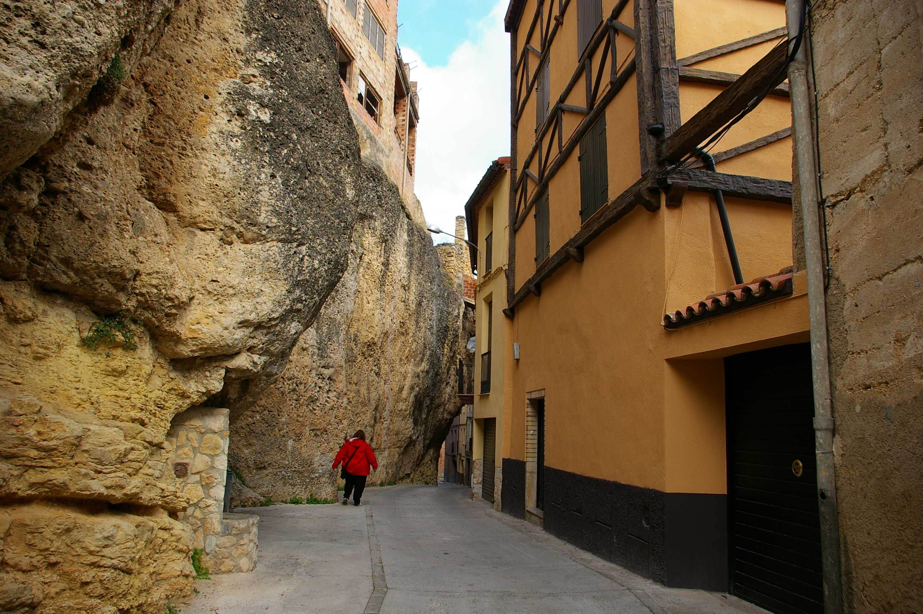 fotografia general de Margalef